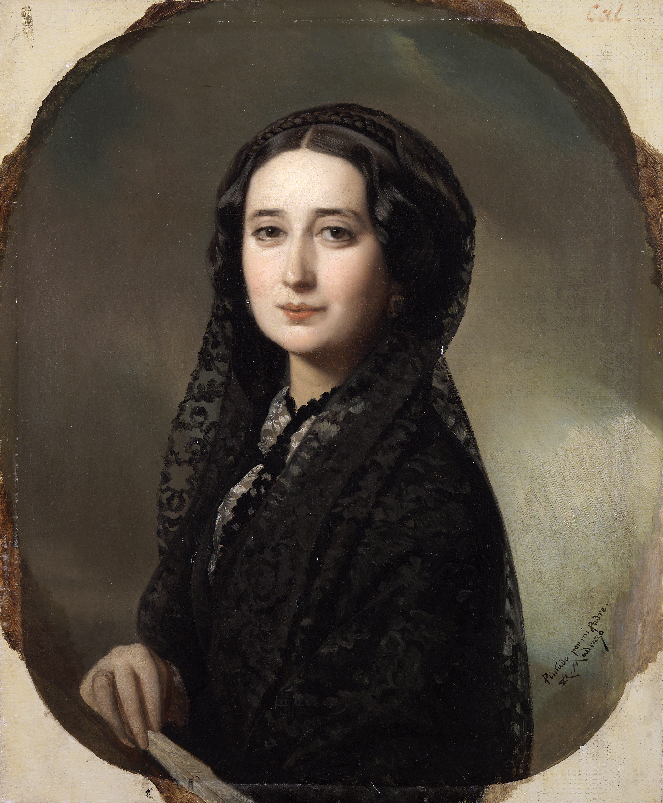 Victoria Carolina Coronado nació en Almendralejo (Badajoz) el 12 de diciembre de 1820. Retrato de busto corto en uno de los más bellos testimonios de la retratística psicológica del pintor, al incidir sobre el rostro de la escritora del que afloran sentimientos que reflejan la profundidad de un alma herida por el reciente fallecimiento de su hijo primogénito. De perfil y vuelto el rostro hacia el espectador, destaca con entonada iluminación su ensoñadora y a la vez decidida mirada que aúna a un rictus de melancolía en la contenida sonrisa que evocan sus labios. Enlutada, cubre parcialmente su cabeza con una mantilla de encaje que deja ver las ondas de su cabello adornado con una trenza natural, subrayando con un punto de luz la transparencia del encaje blanco y la intensidad del terciopelo negro que ribetea su camisa interior. A la escasa paleta cromática desarrollada, entroncada en la más pura tradición nacional barroca, aúna también el pintor el recurso de la mano que sujeta el abanico asomando por encima de la natural enmarcación, en contraste con la suave degradación tonal que cierra de forma difusa el fondo del retrato en sugerentes formas que evocan paisajes de corte romántico (Texto extractado de Gutiérrez, A. en: El retrato español en el Prado. De Goya a Sorolla, Museo Nacional del Prado, 2007, p. 136).